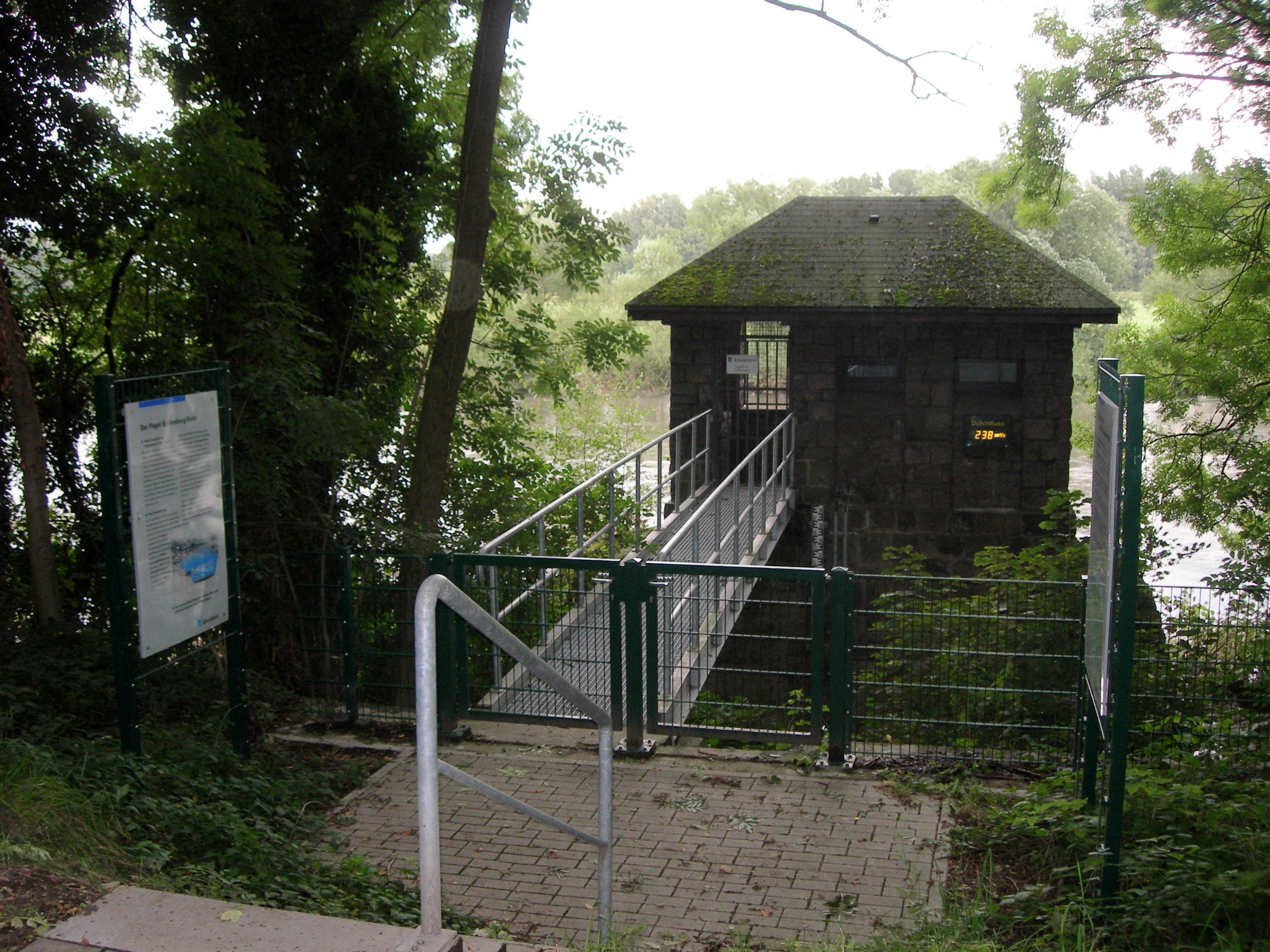 Pegel Spillenburg (nicht Schleusenhaus), Stream gauge, Essen-Steele